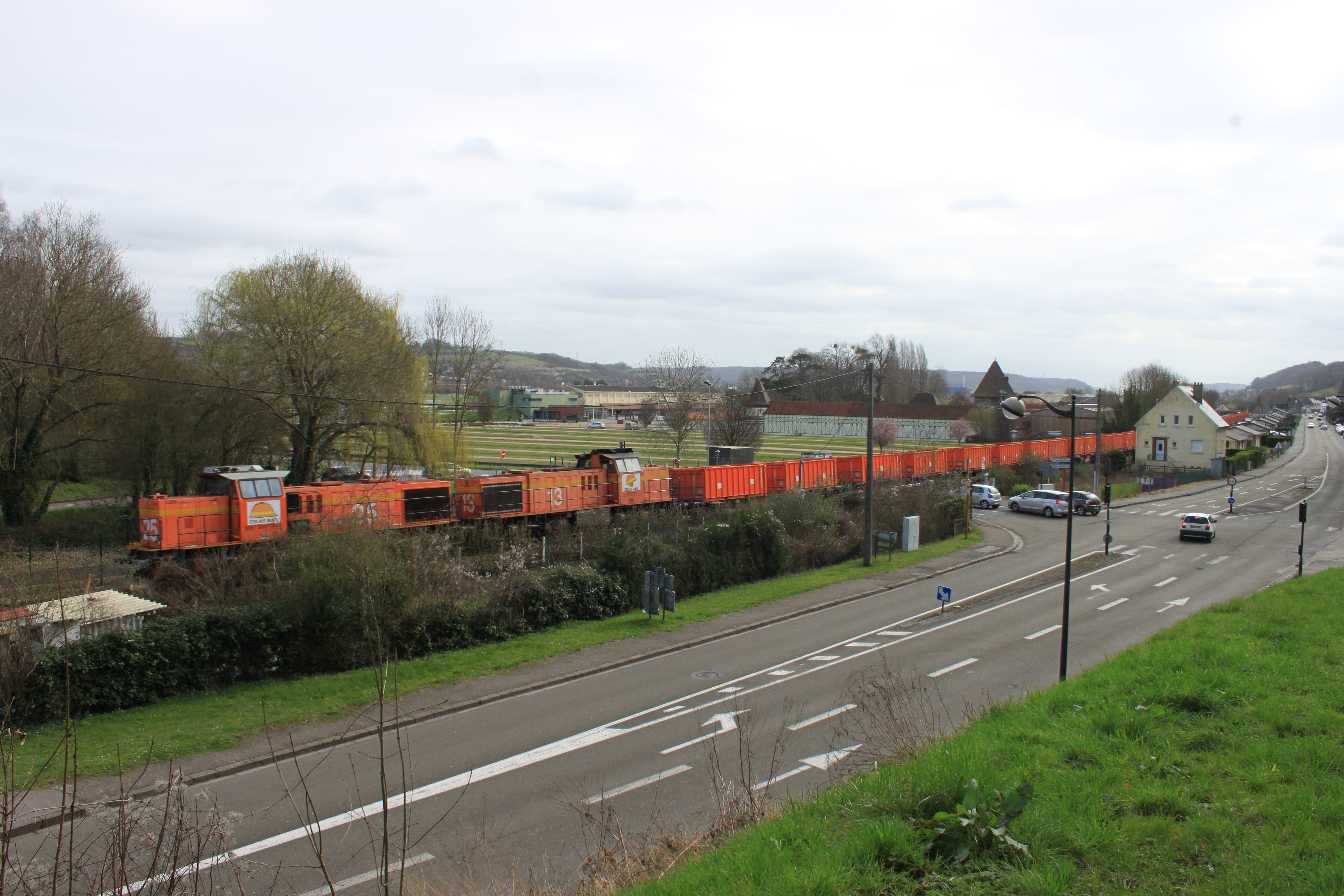 ligne de PONTOISE à DIEPPE, Rouxmesnil-Bouteille(76), PN112, passage d'un train chargé de la terre issues du chantier d'une section de la RN27(près de Tourville-sur-Arques) . Ce train ce dirige vers la gare de Dieppe (il y changera de bout pour tirer jusqu'au Terminal Forestier du port de Rouen . Ensuite chaque benne sera placée sur une remorque routière pour décharger la terre de la région dieppoise près du quartier Flaubert à Rouen) .